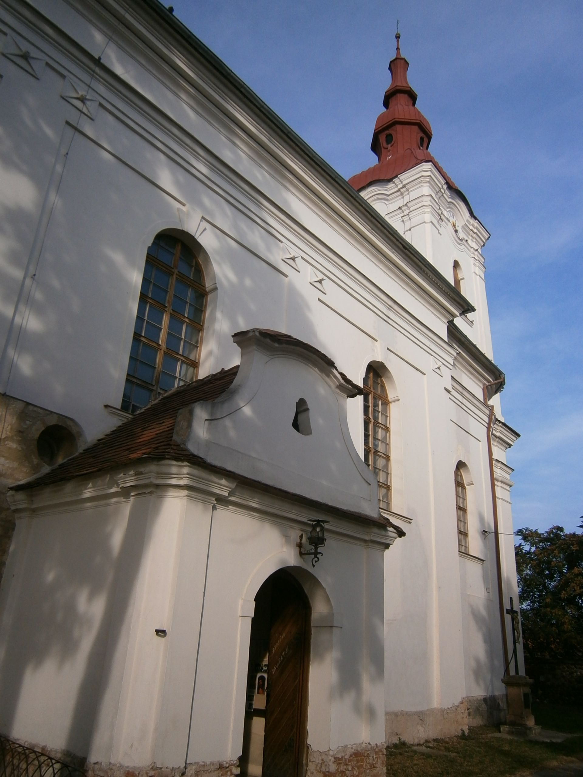 Kostel sv. Gottharda (Modřice), nám. Míru, Modřice